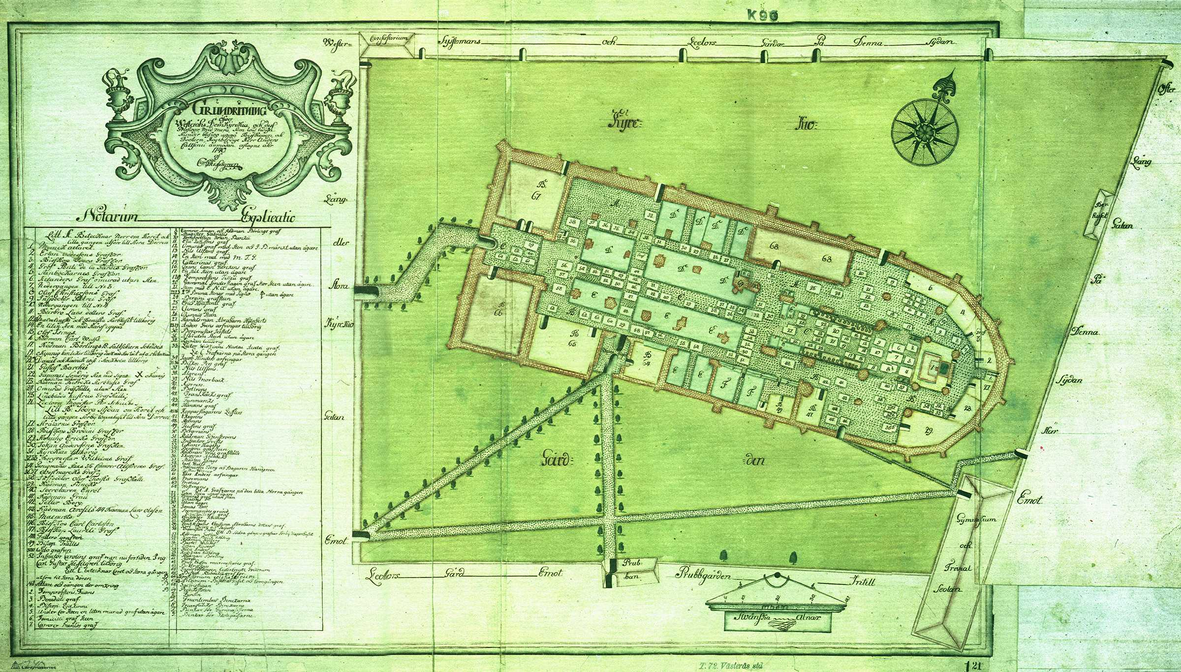 Planritning över Västerås domkyrka från 1740.